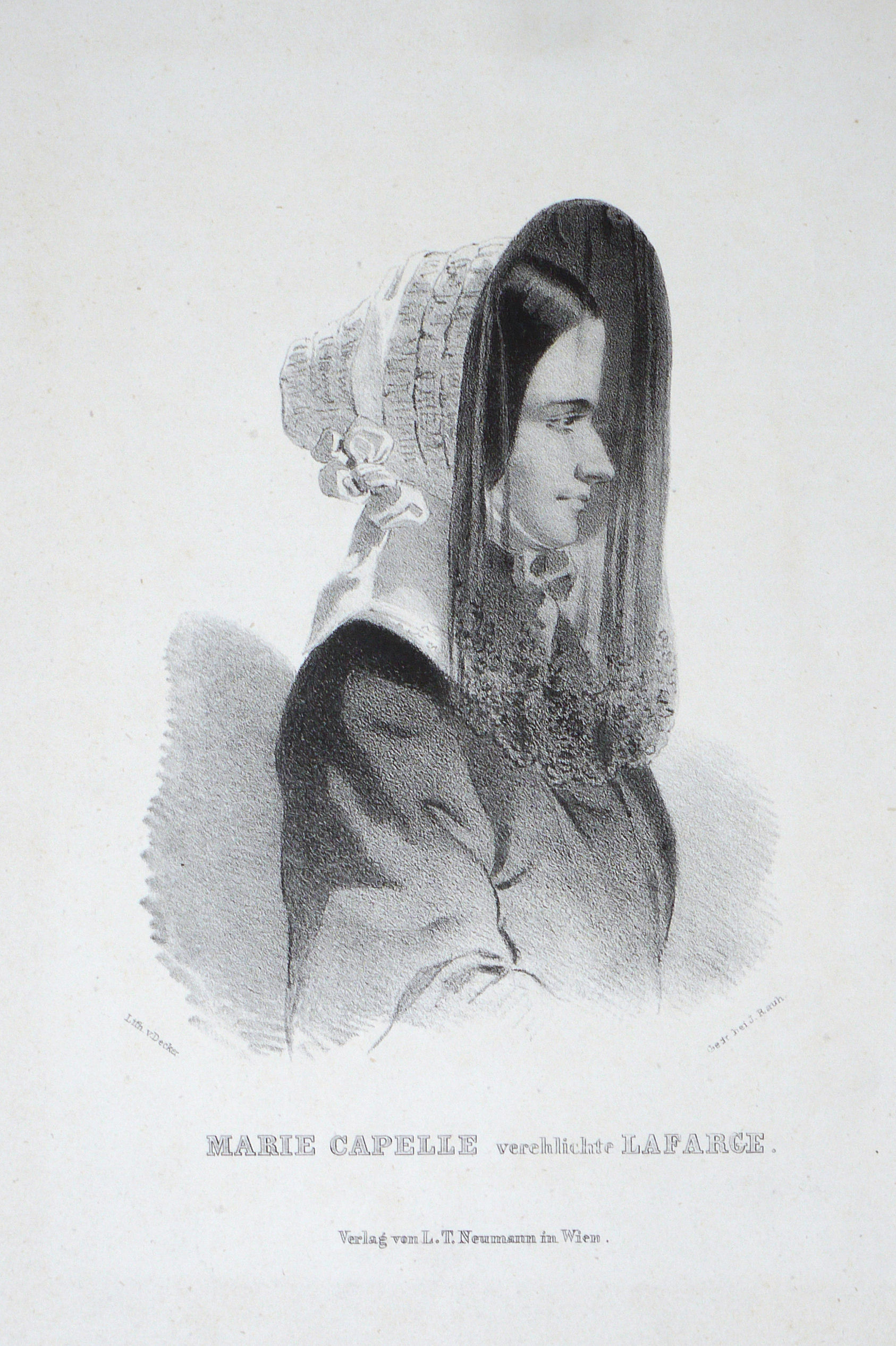 Marie Lafarge, ge. Capelle (1816-1852) französische Giftmörderin Lithographie von Gabriel Decker, um 1850